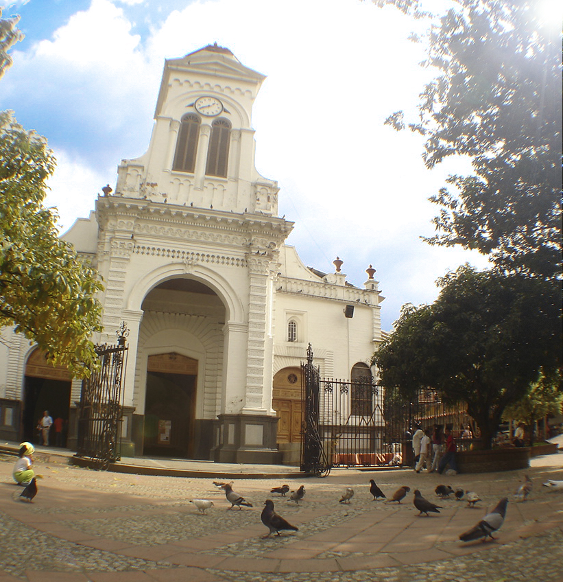 Iglesia de Santa Ana. Sabaneta, Colombia.